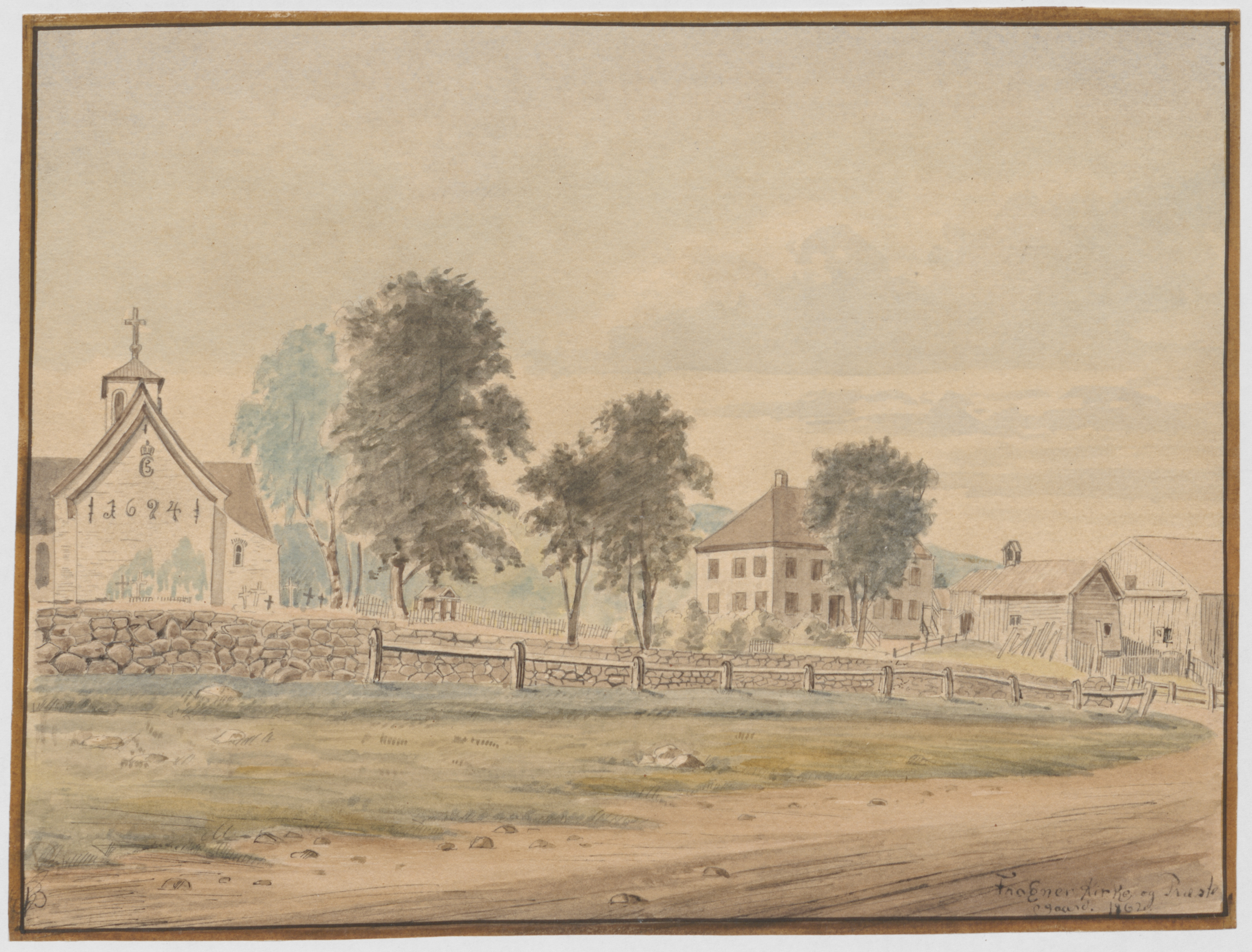 Bildet er hentet fra Riksantikvaren. Frogner kirke og prestegård Eier : Riksantikvaren Sted : Norway, Buskerud, Lier Emneord: STEINKIRKER, EMBETSBOLIGER , PRESTEGÅRDER Medium : Akvarell 84301 86476 84301] in the Norwegian Directorate for Cultural Heritage database.